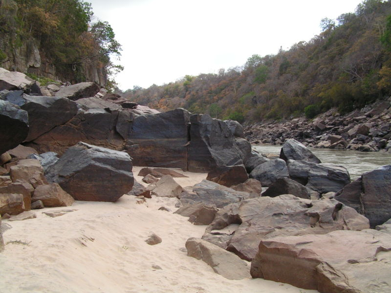 Gorges Stieglers dans la réserve de gibier de Sélous, Tanzanie